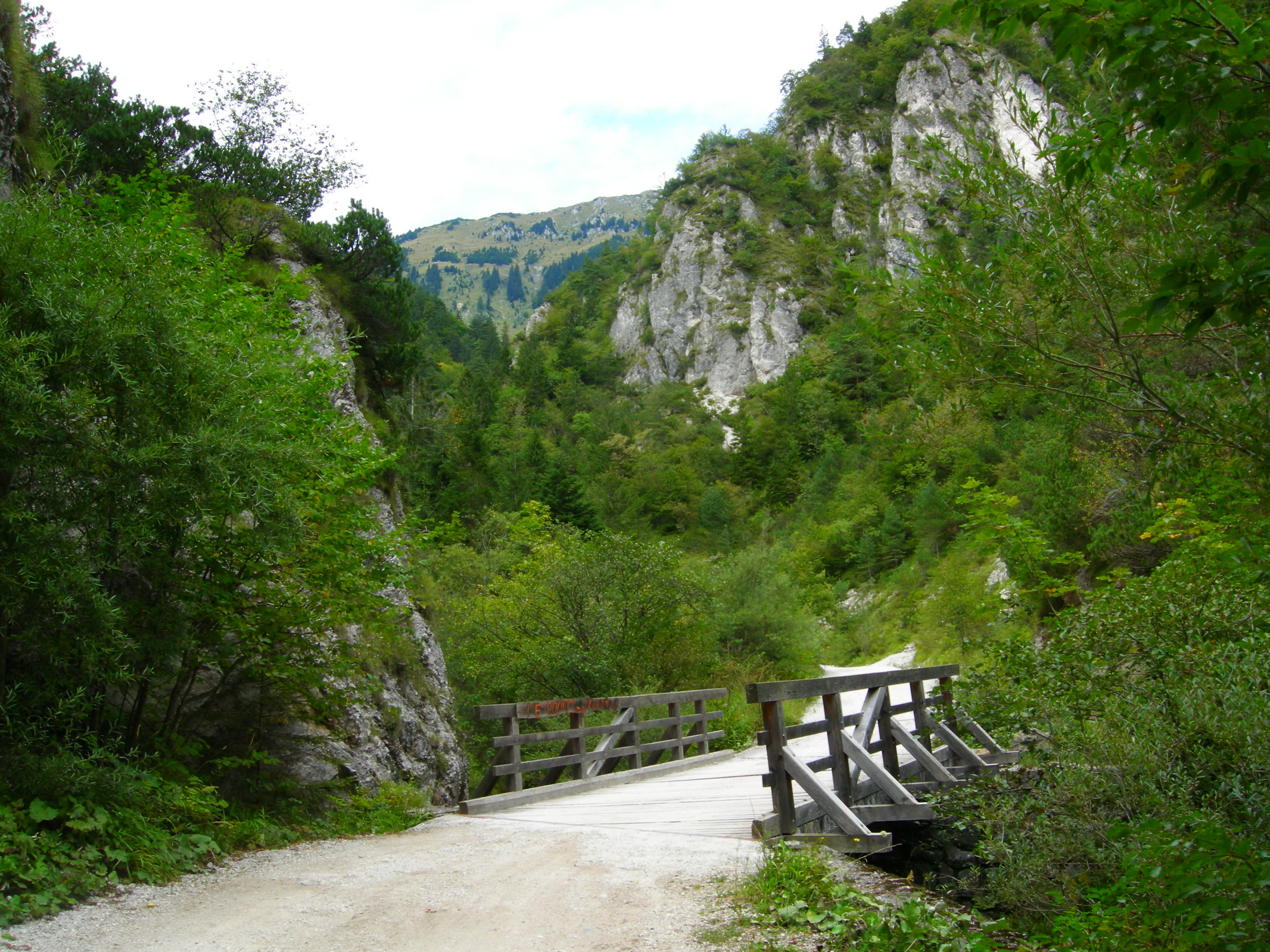 Dolina Draga pri vasi Begunje na Gorenjskem